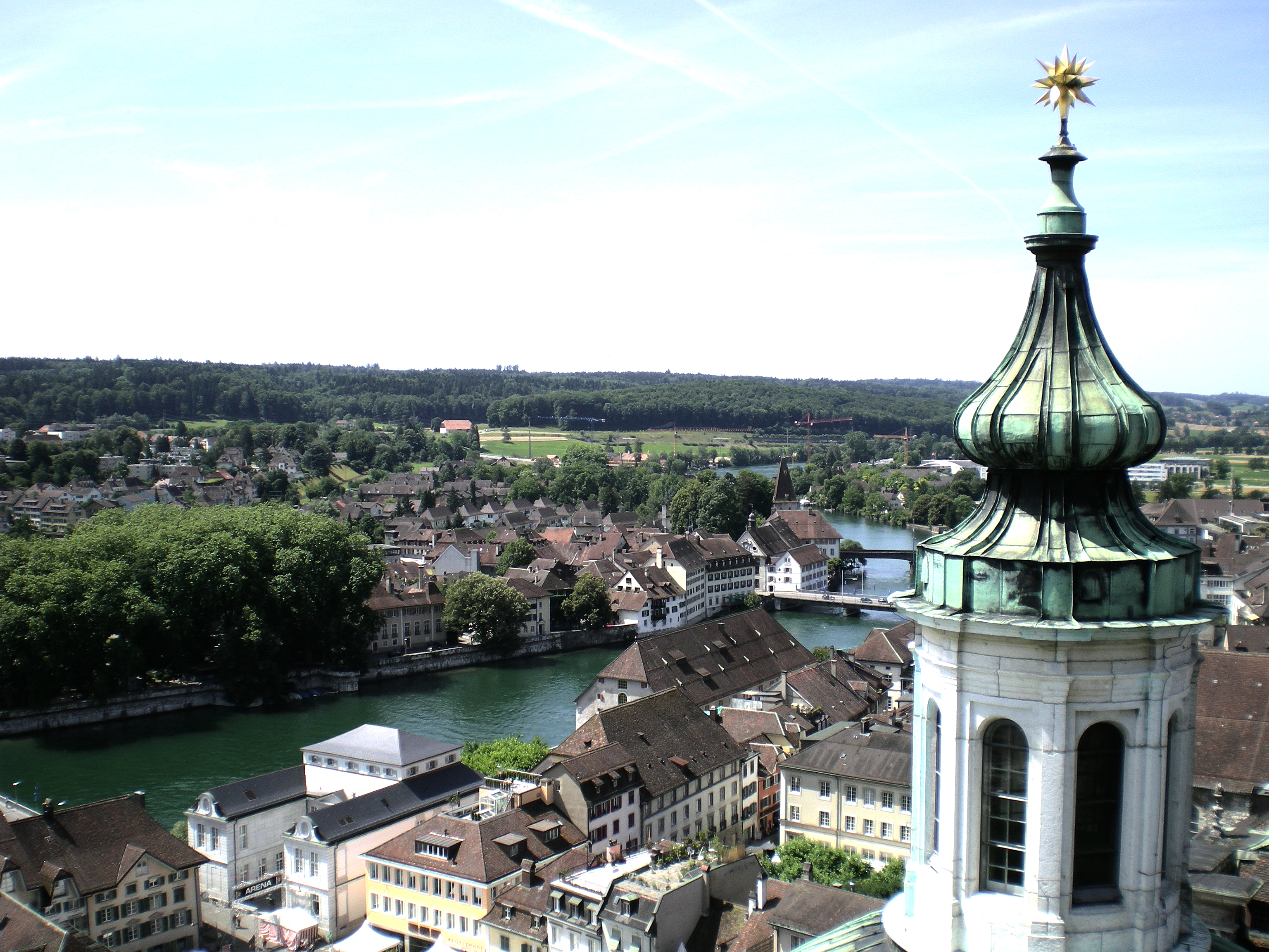 Vom St. Ursenturm Blick in die Vorstadt